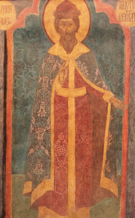 Архангельский собор. Условные портреты князей на столпах